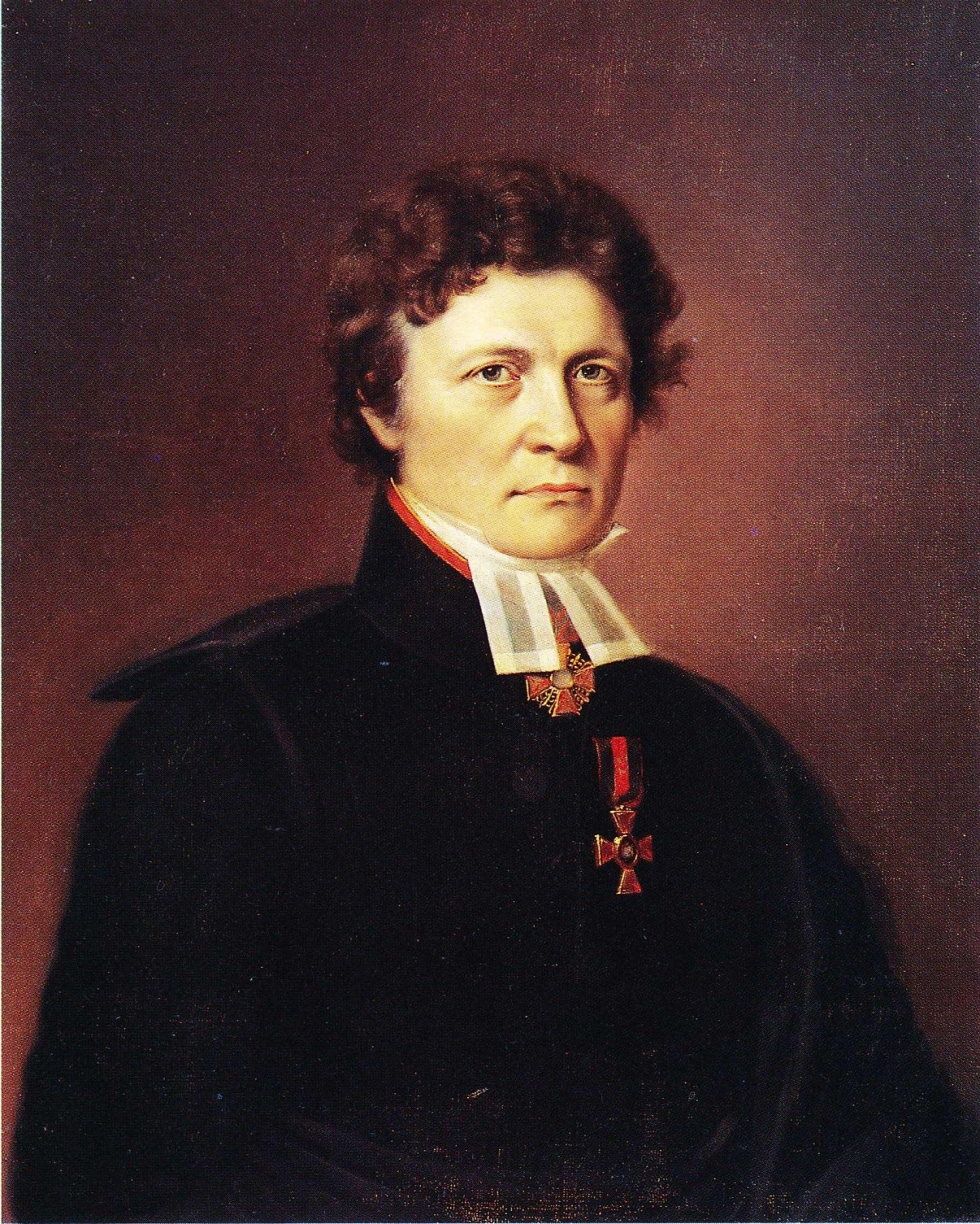 Helsingin yliopiston fysiikan professori Gustaf Gabriel Hällström (1775–1844), todennäköisesti Johan Erik Lindhin maalaama muotokuva. Muotokuva kuuluu Helsingin yliopiston kokoelmiin, mutta sen omistaa yliopiston Pohjalainen valtuuskunta.